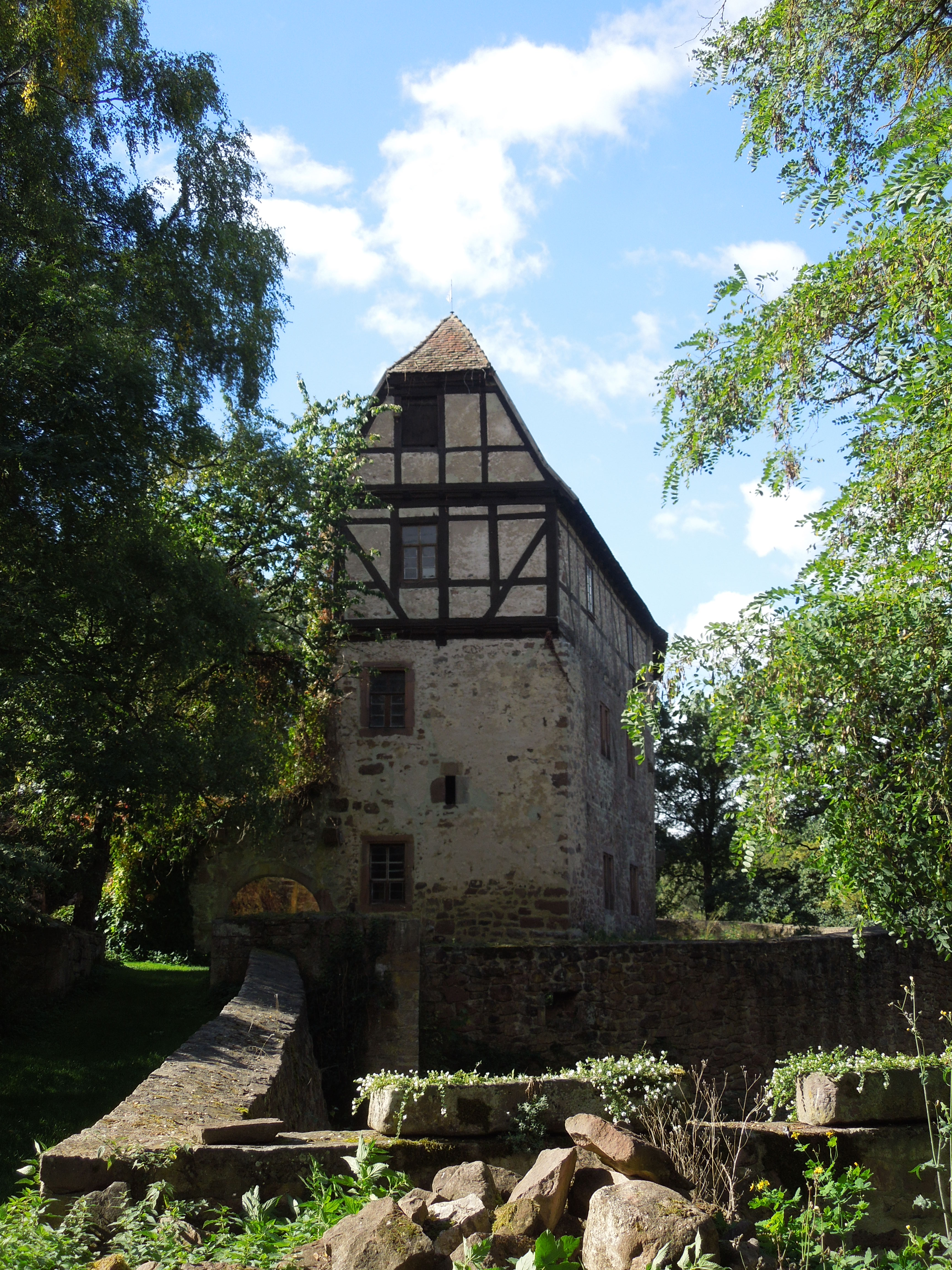 Der Palas ("Langer Bau") der Urff'schen Burg, gesehen von Osten